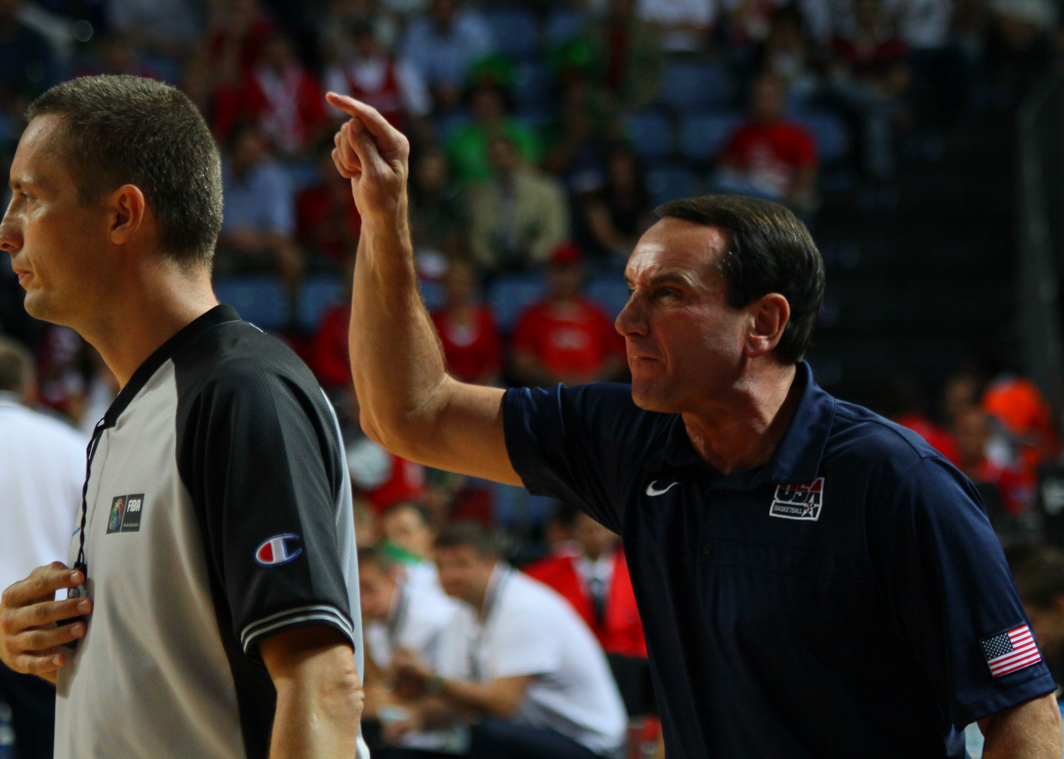 Mike Krzyzewski, increpando a alguien en el Mundial de baloncesto 2010, siendo seleccionador de Estados Unidos.